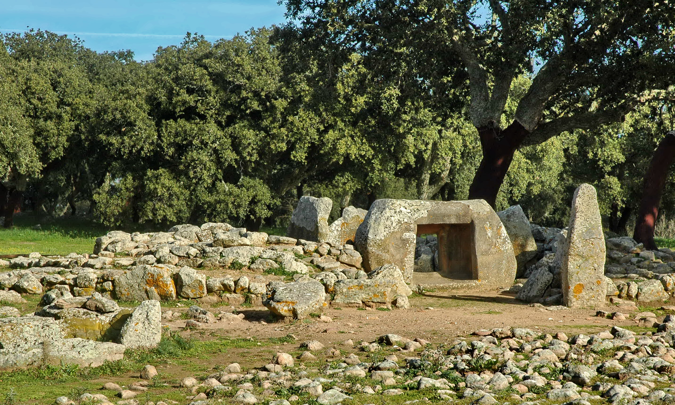 Area archeologica di Pranu Muttedu - MIBAC This is a photo of a monument which is part of cultural heritage of Italy.